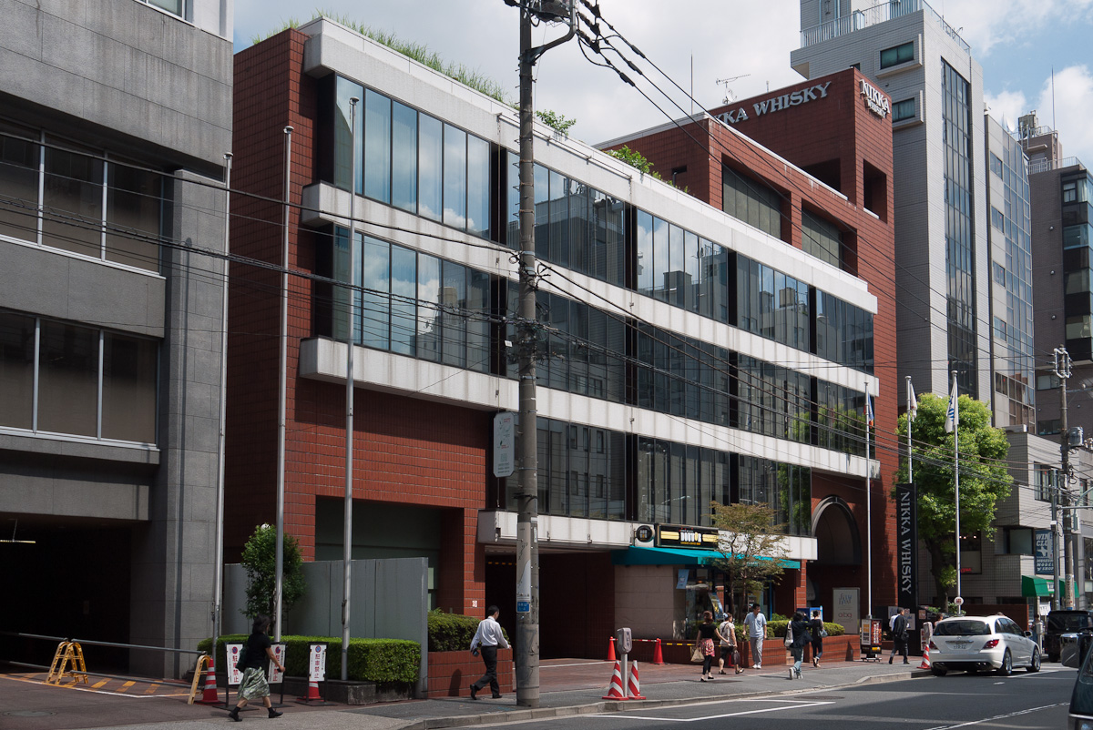 ニッカウィスキー本社、東京都港区南青山。